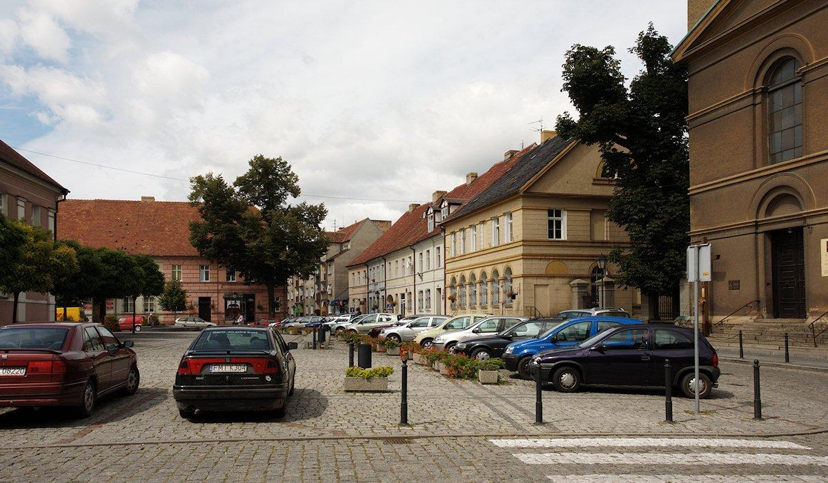 Północna strona Rynku. Po lewej fragment usytuowanego centralnie ratusza.